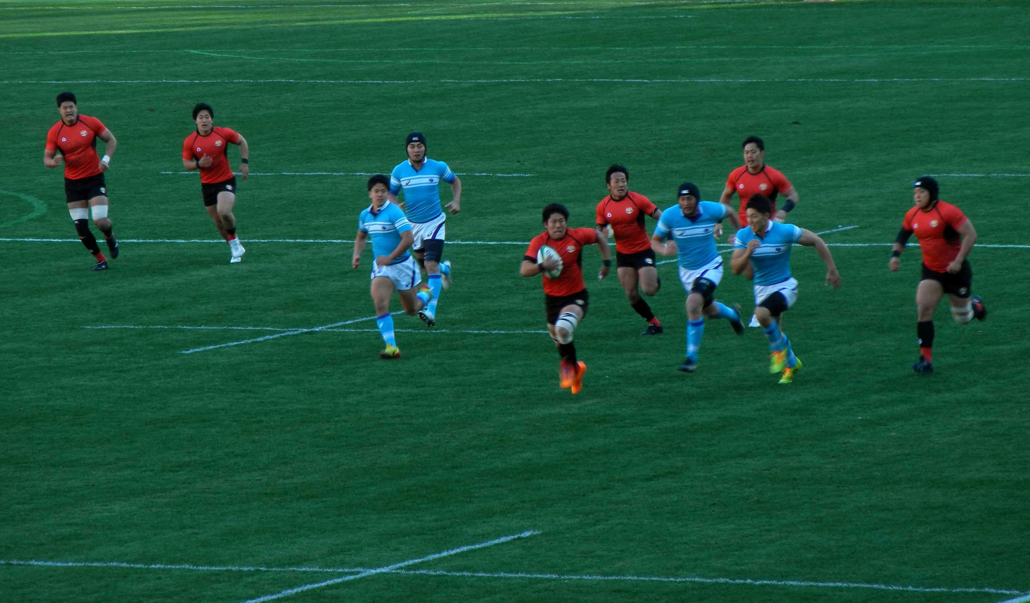 第51回大学選手権決勝 筑波大学 対 帝京大学